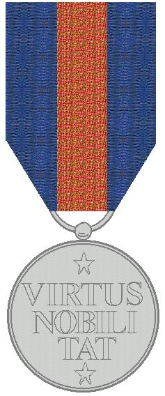 De Orde van de Nederlandse Leeuw kende tot 1994 de graad van Broeder. Eigen tekening Robert Prummel